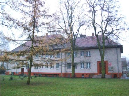 Klub Garnizonowy. Choszczno - w tym mieście stacjonuje jednostka.